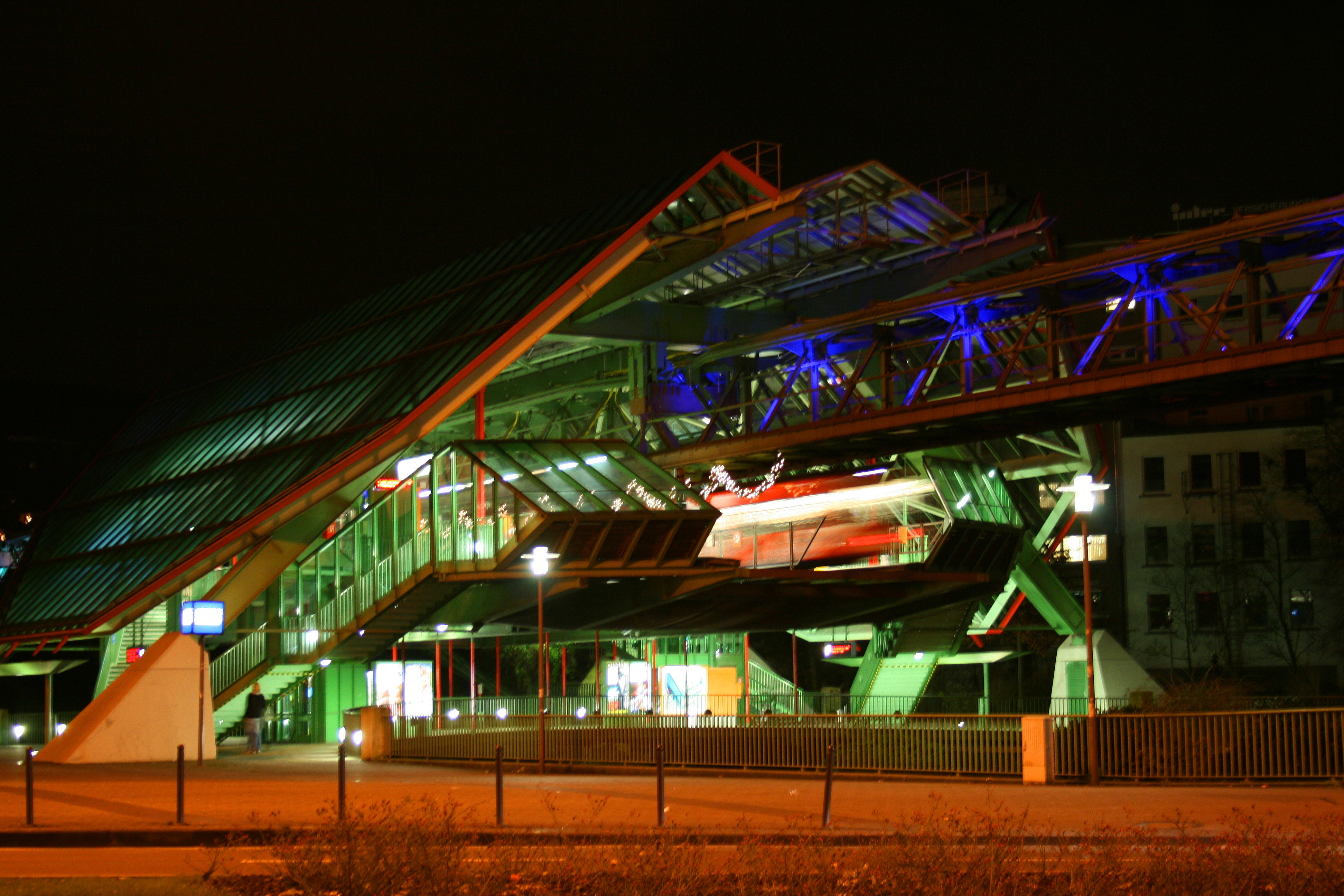 Schwebebahnstation Kluse in Wuppertal